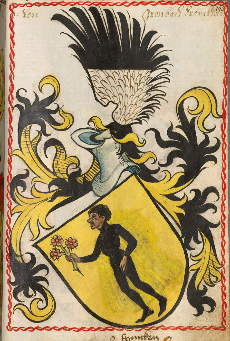 Scheibler'sches Wappenbuch , älterer Teil Grumbach